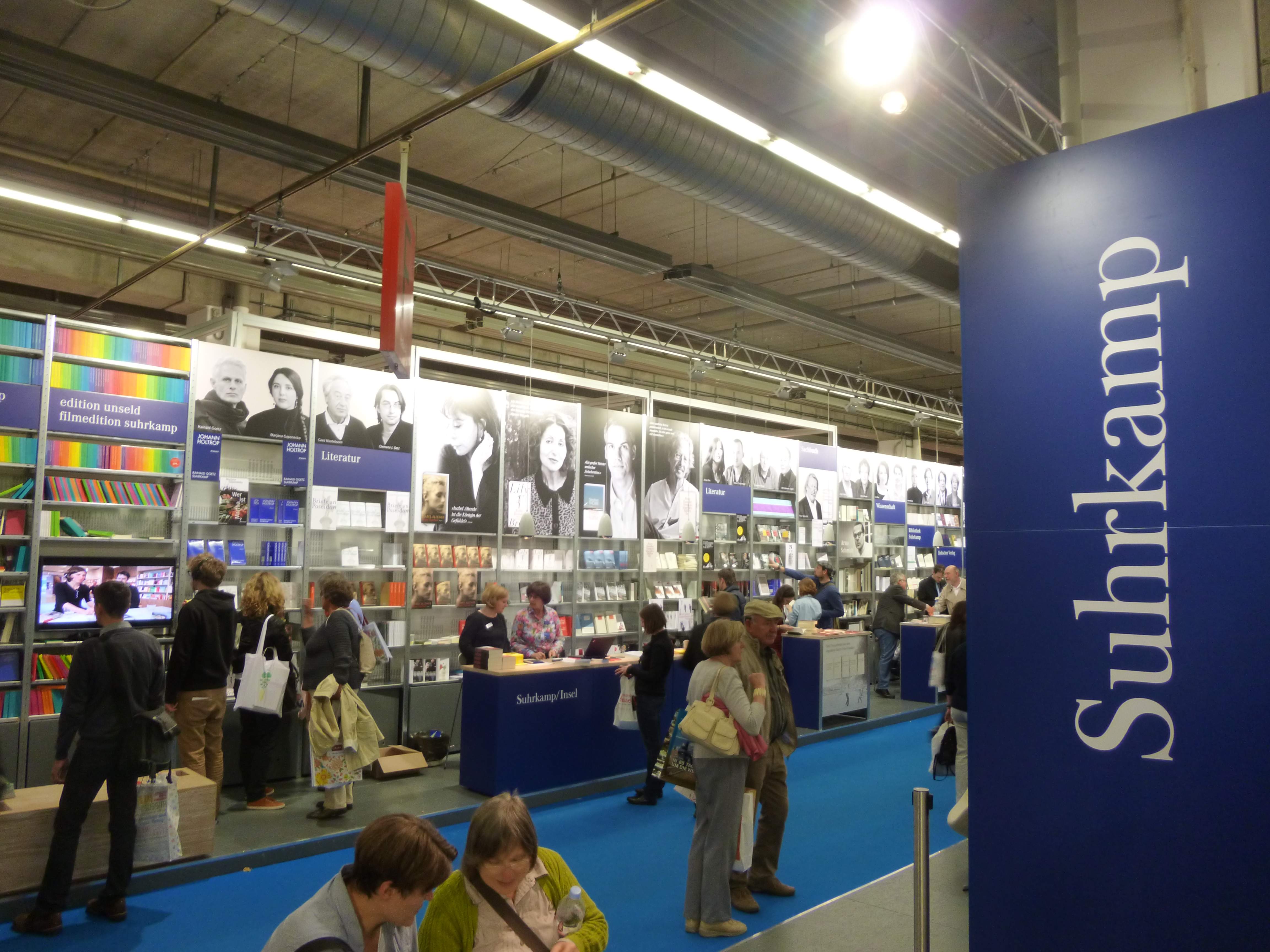 stando de la eldonejo Suhrkamp en la Frankfurta librofoiro 2012